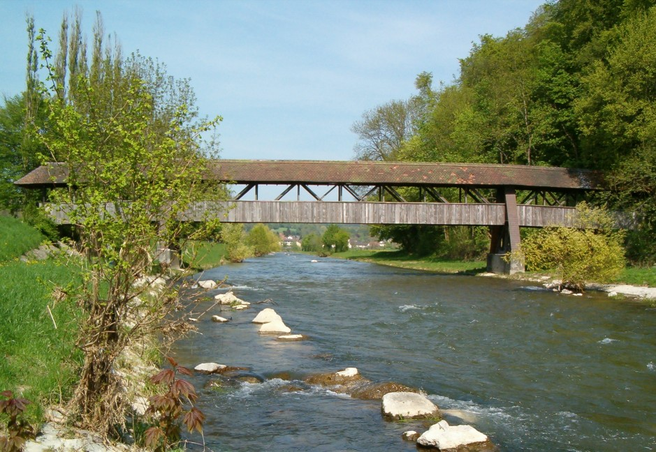 Die Wutach bei Tiengen zwischen Steina- und Schlüchtmündung. Blick flussaufwärts etwa bei Fluss-Kilometer 2,7. Die gedeckte Holzbrücke verbindet den Stadtteil Tiengen der Stadt Waldshut-Tiengen (links) mit dem Naherholungsgebiet Bürgerwald. Aufnahme vom 04. Mai 2006. Foto: G. Boll, Waldshut.